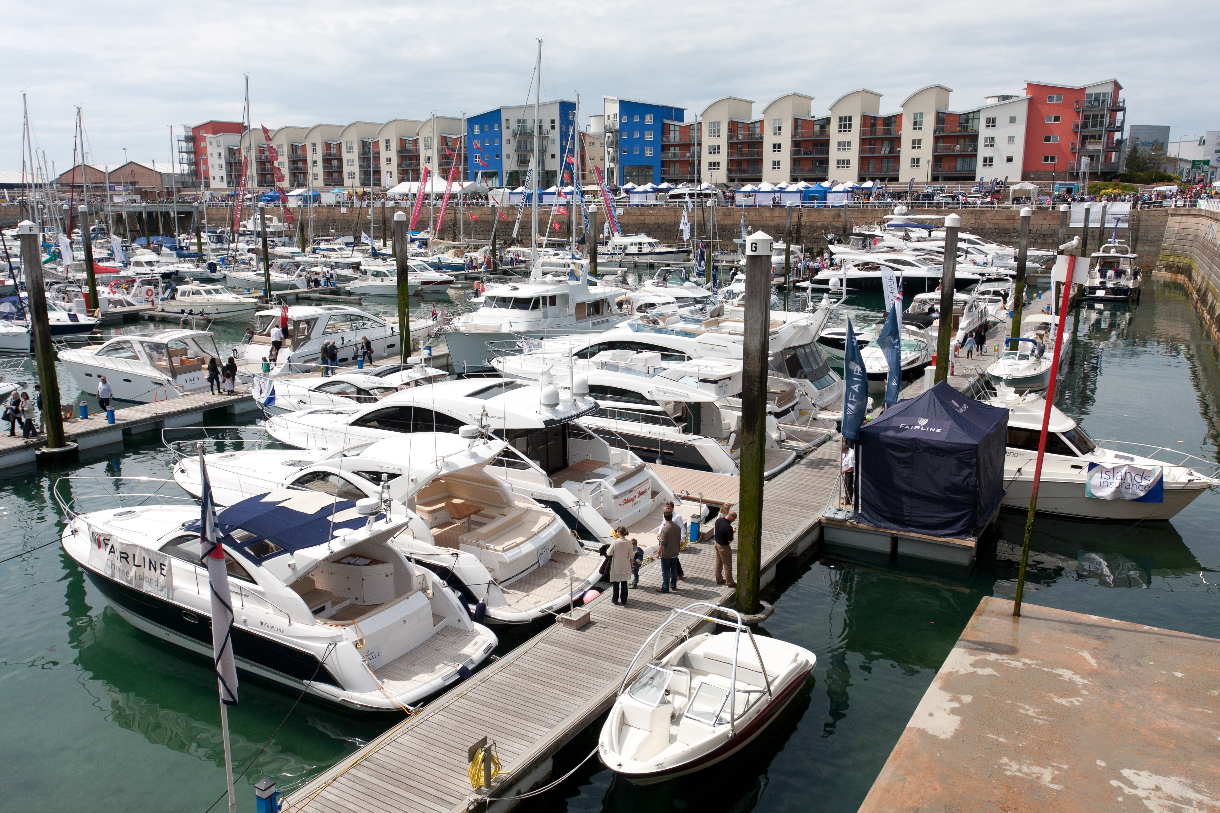 Boats in St. Helier Marina, Channel Islands.